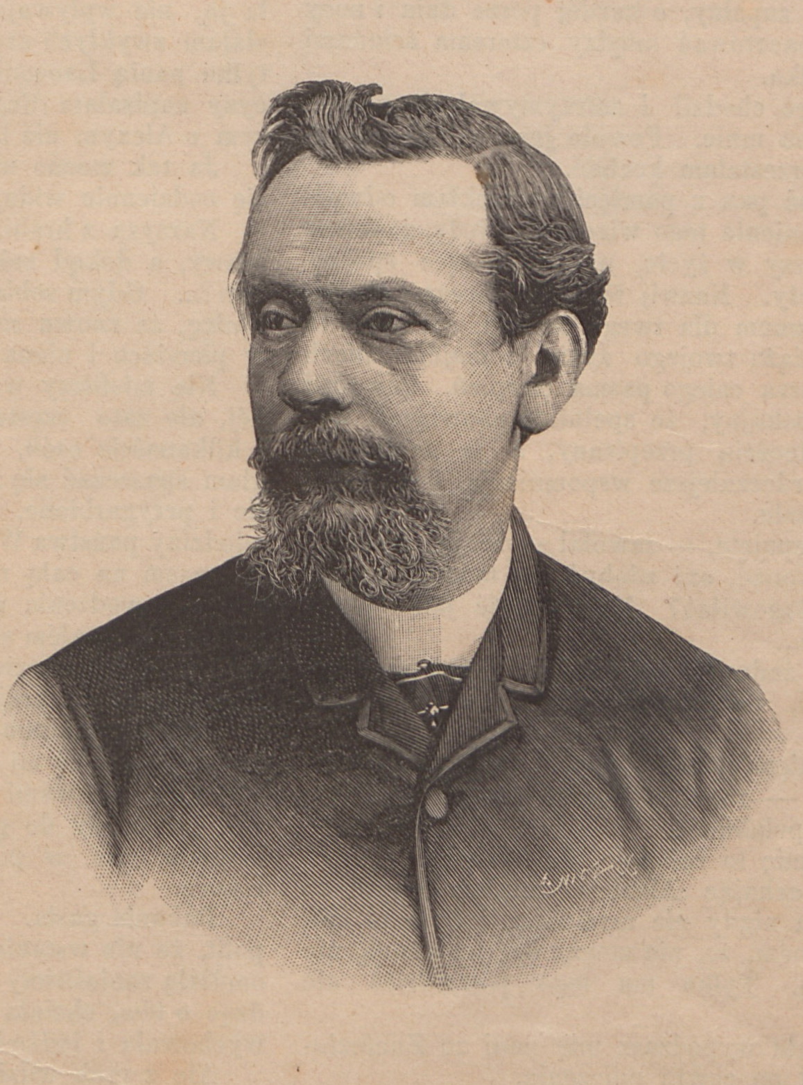 Teodor Werner